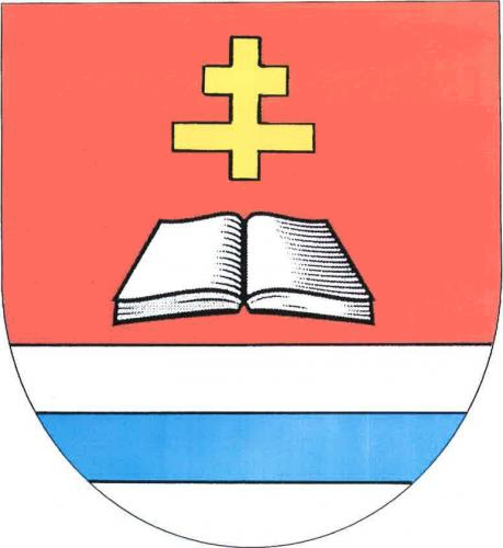 Bohuňov (okres Svitavy), znak obce. Blason: Sníženě červeno-stříbrně dělený štít. Nahoře stříbrná otevřená kniha převýšená zlatým patriarším křížem, dole modré břevno.